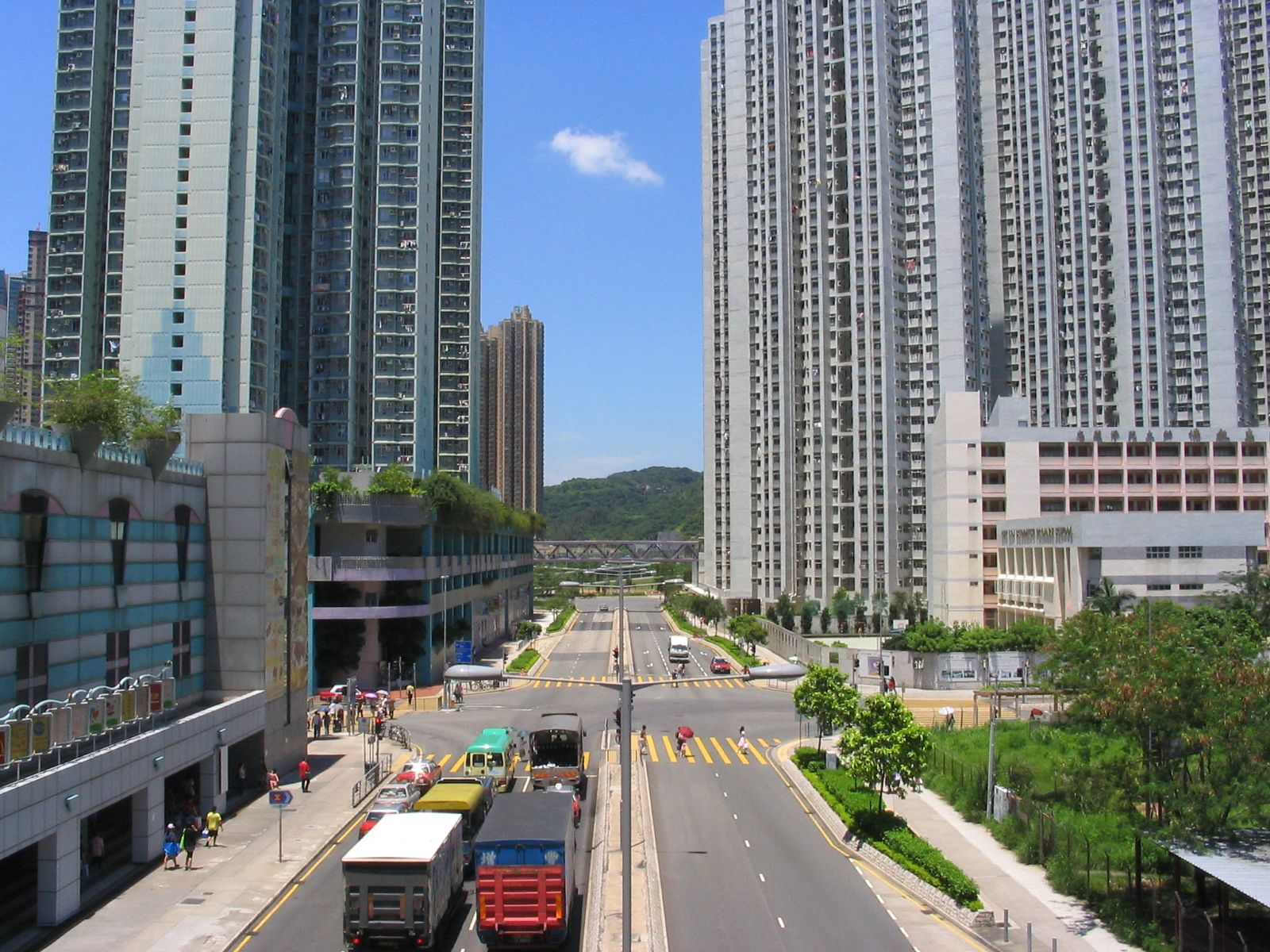 將軍澳-唐明街 Tong Ming Street, Tseung Kwan O